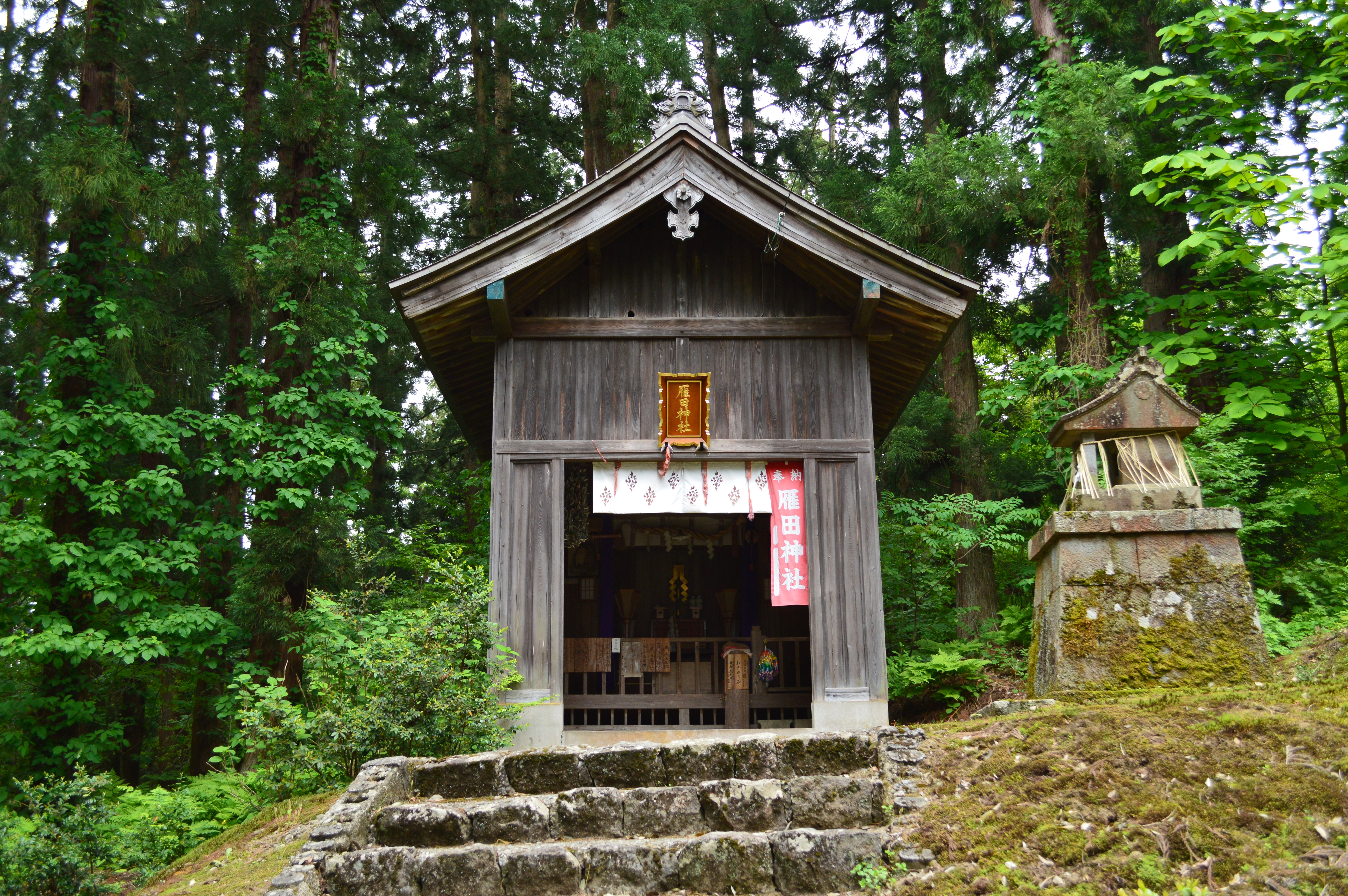 斐太神社 境内雁田神社 Nikon D3200